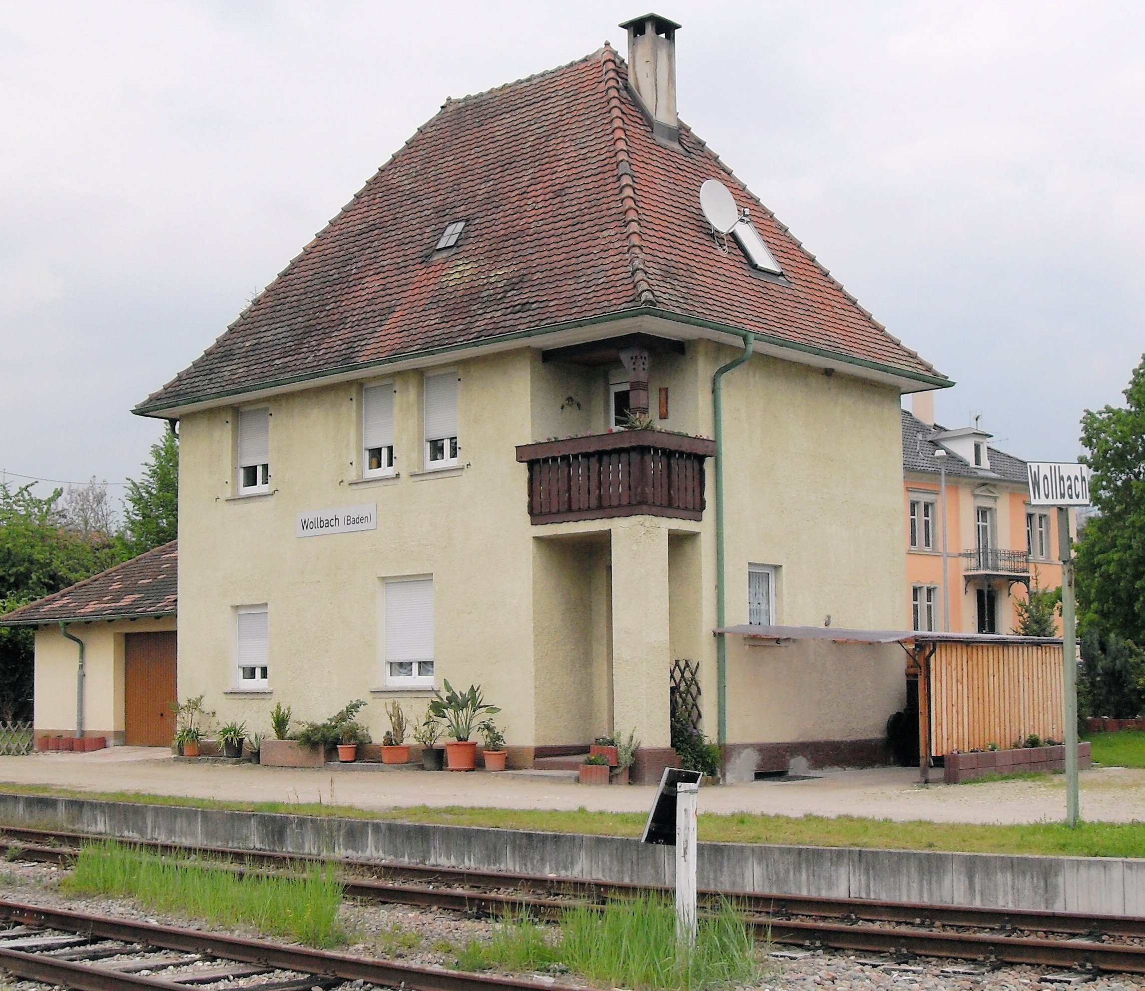 Bahnhof Wollbach (Baden) an der Strecke der Kandertalbahn, genutzt von der Straßenmeisterei Wollbach